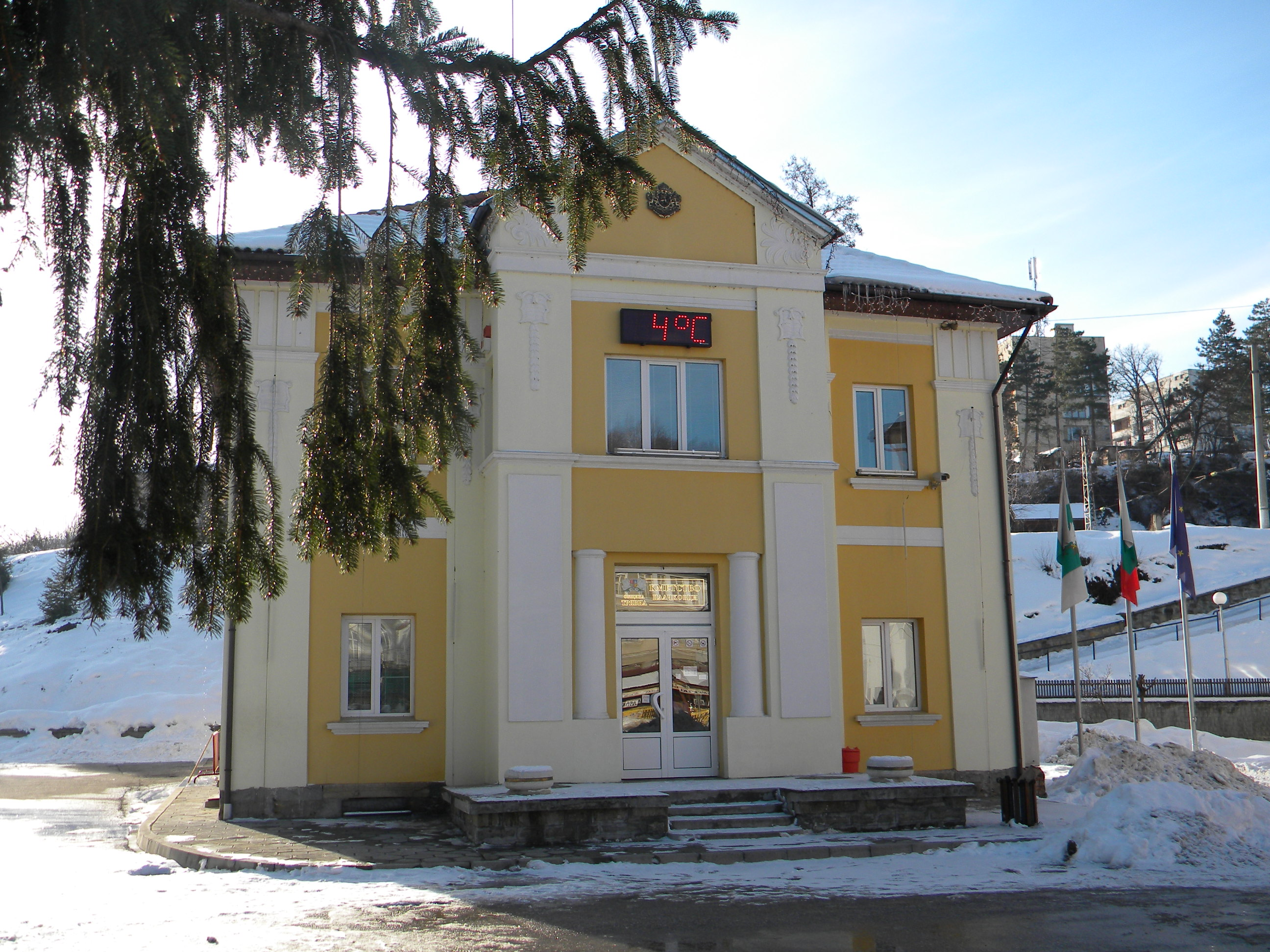 Общината в Плачковци